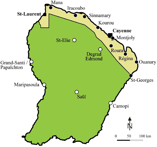 Carte de l'Arrondissement de l'Inini en 1952 modifié à partir de Fr. Piantoni, 2008